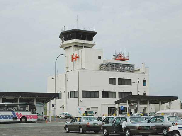 秋田空港ビル